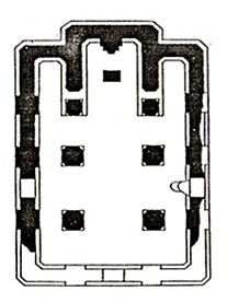 План Прачысценскай царквы, Гродна